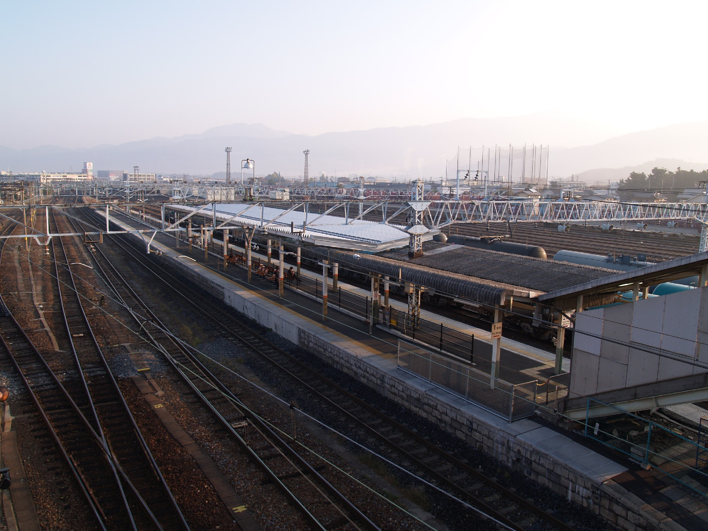 南松本駅